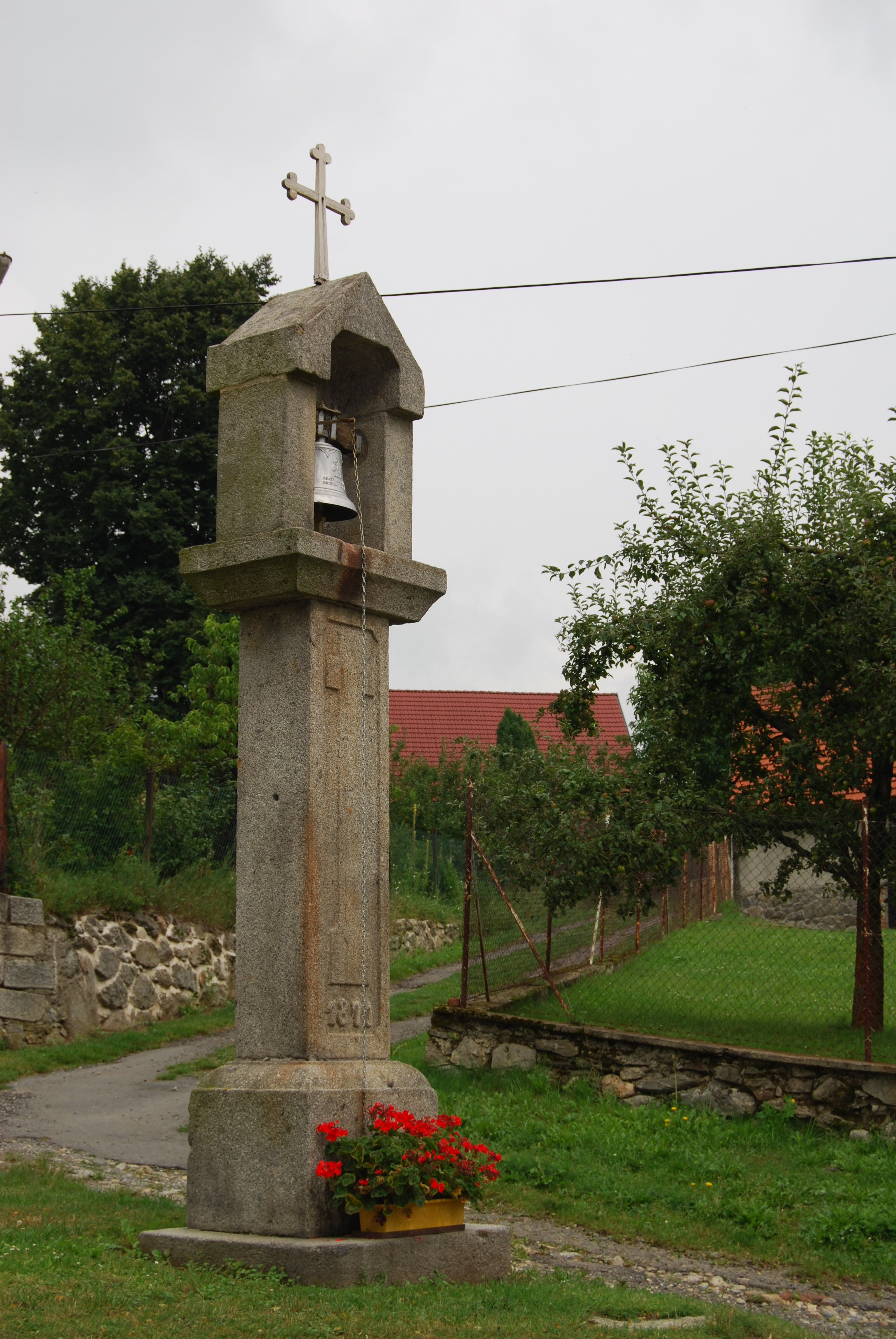 Kamenná zvonice. Chotětice je část města Sedlec-Prčice v okrese Příbram. Česká republika.